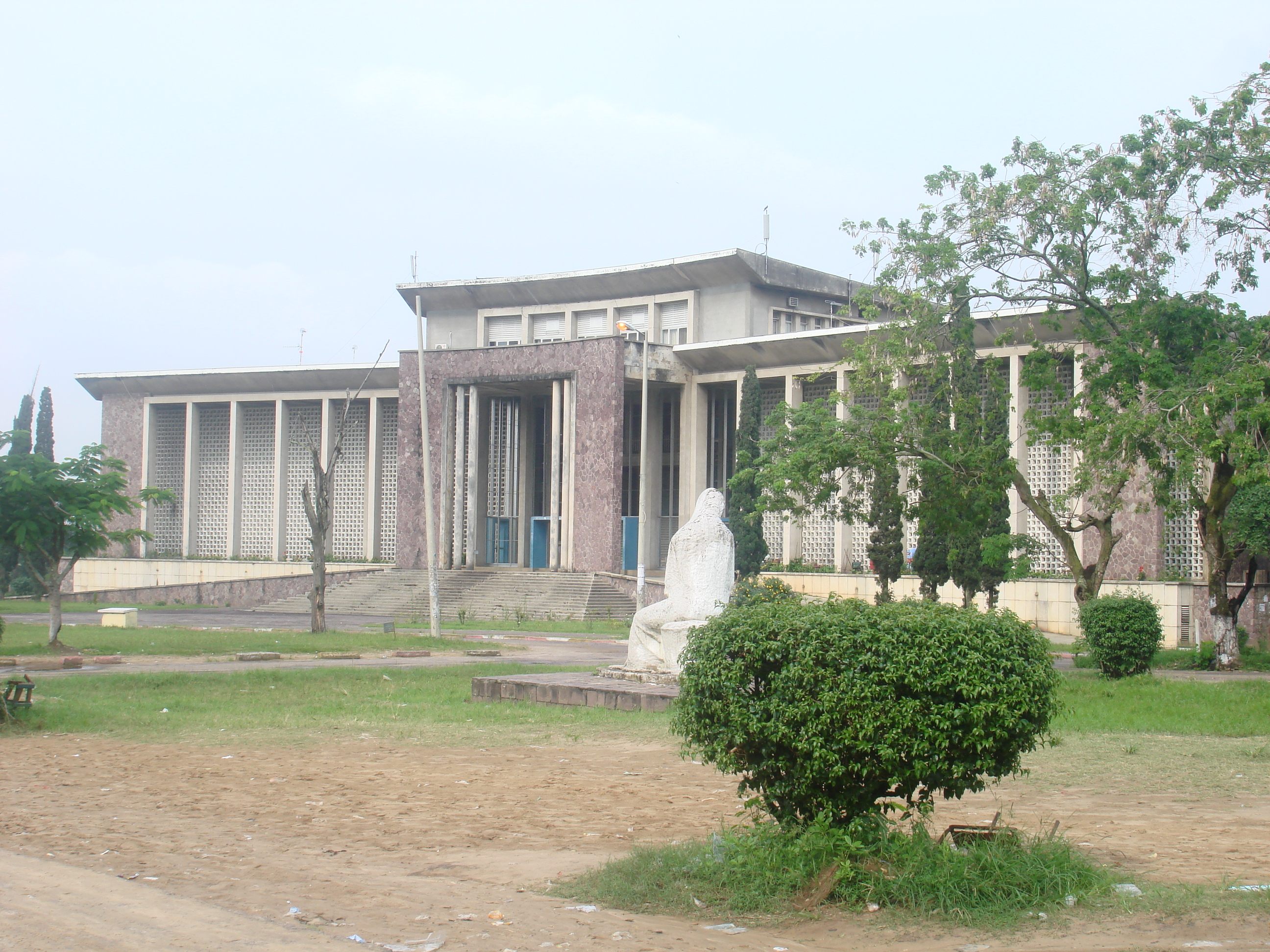 Unikin, Rectorat. "La colline inspirée, le lieu par excellence du savoir et du partage des connaissances".